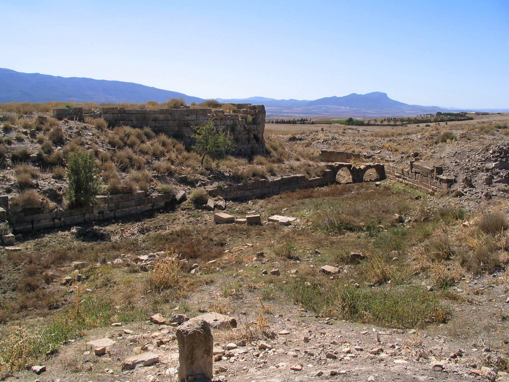 Ruines du fort byzantin